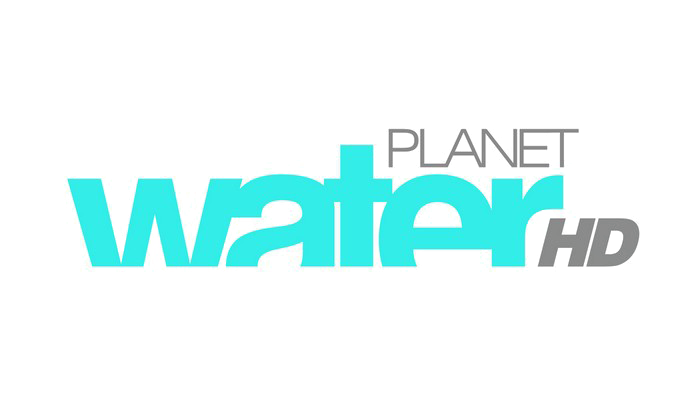 logo kanału w 2012